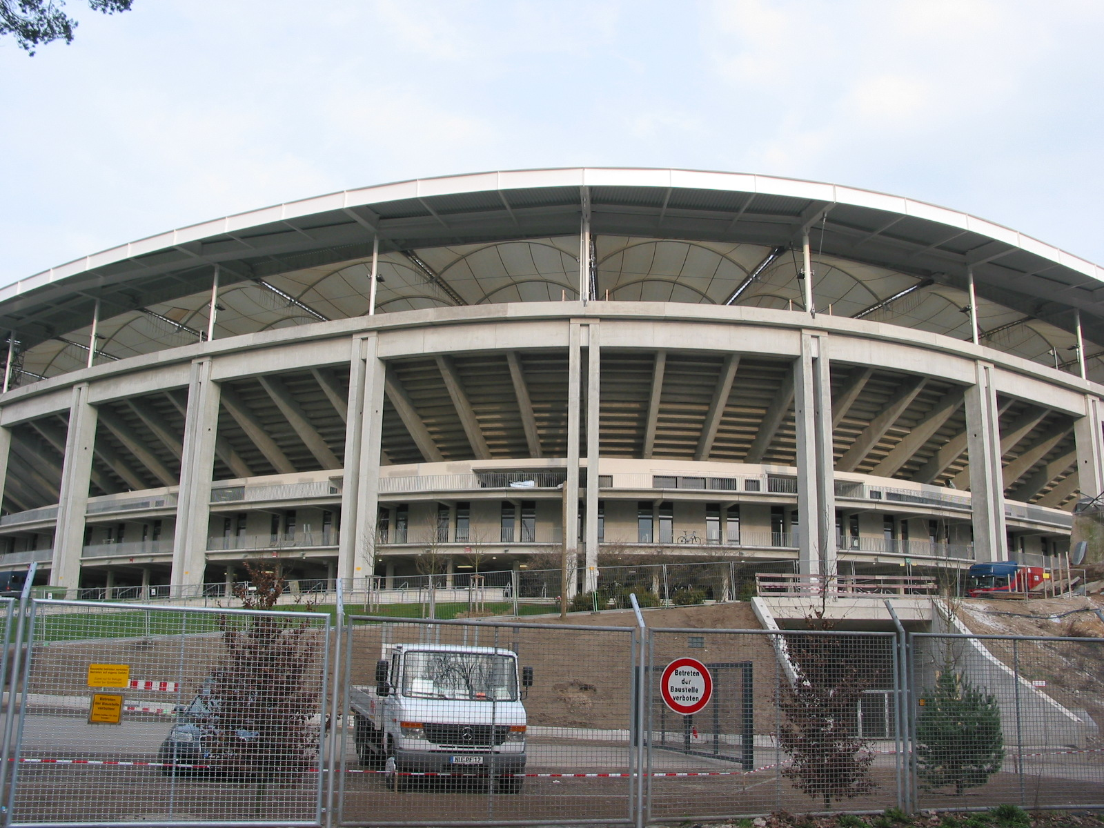 Commerzbank-Arena (Frankfurt/Main) im Bau